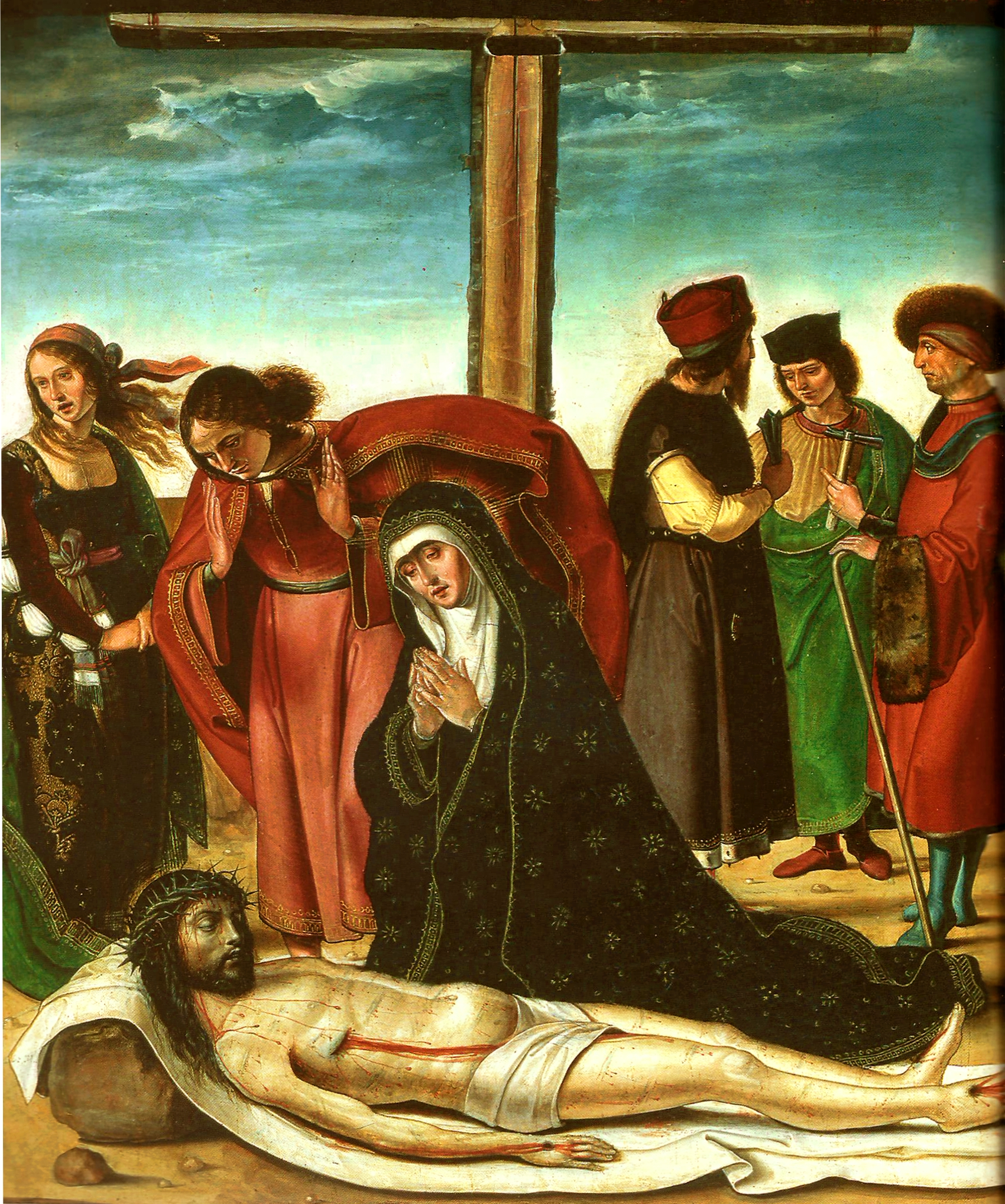 Lamentación ante el cuerpo muerto de Cristo.